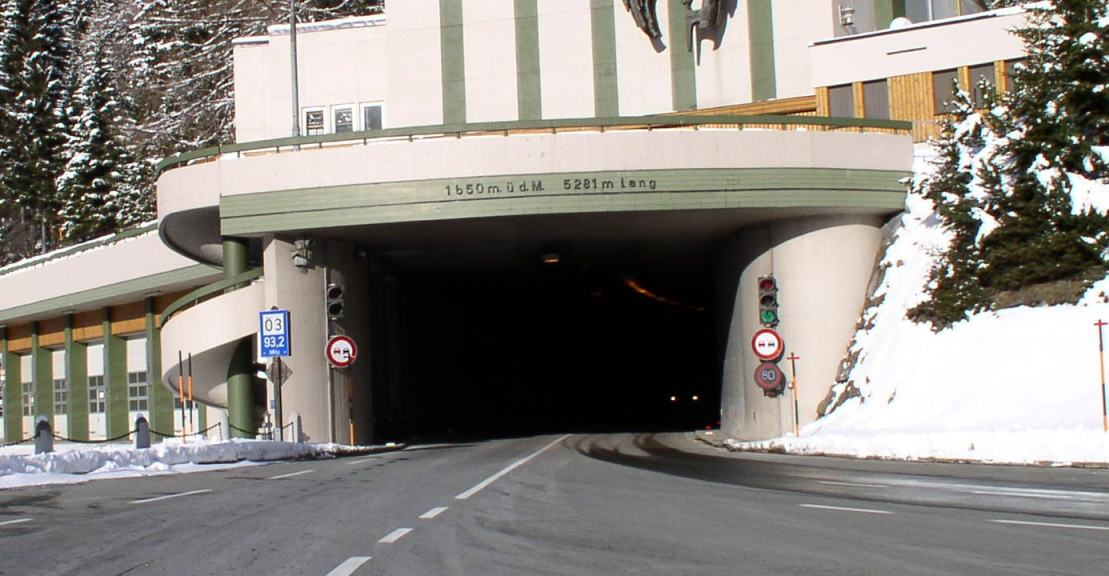 Bild vom Felbertauer-Tunnel, groß